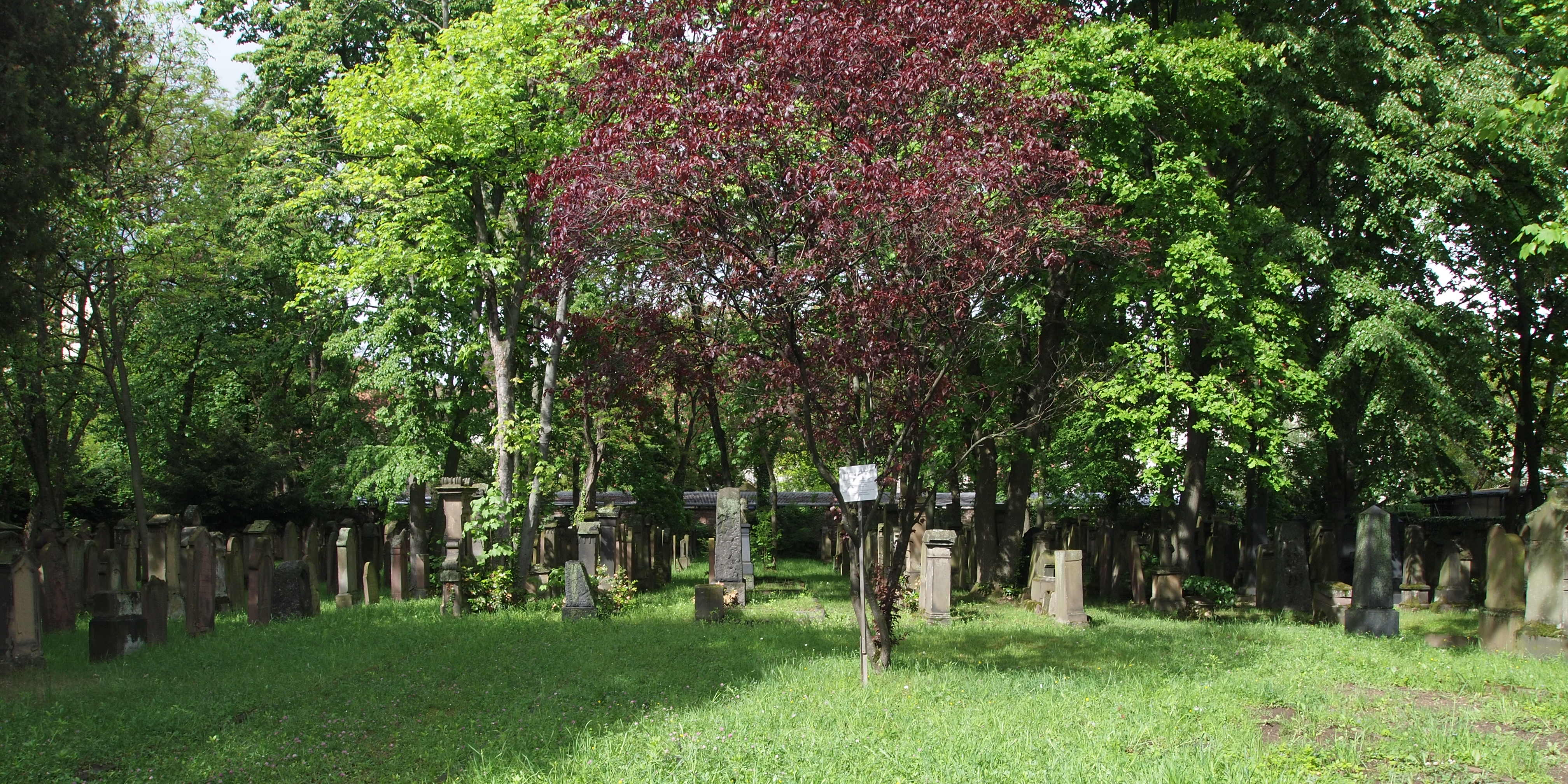 Alter jüdischer Friedhof Karlsruhe